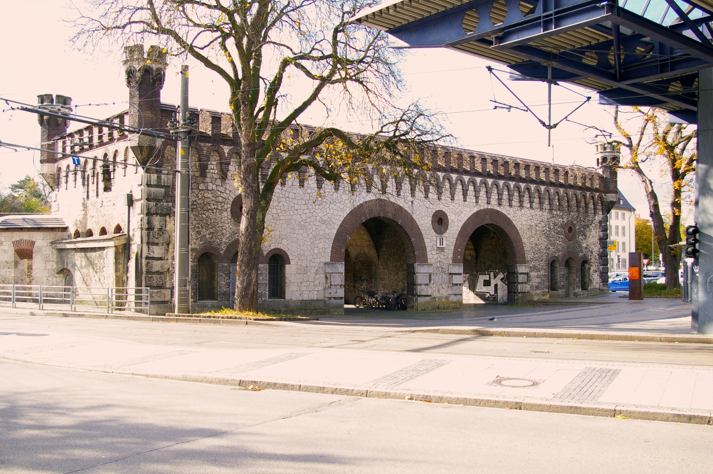 Ehinger Tor